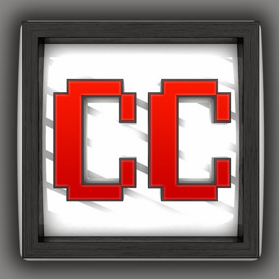 Logotipo do Canal Canalha.